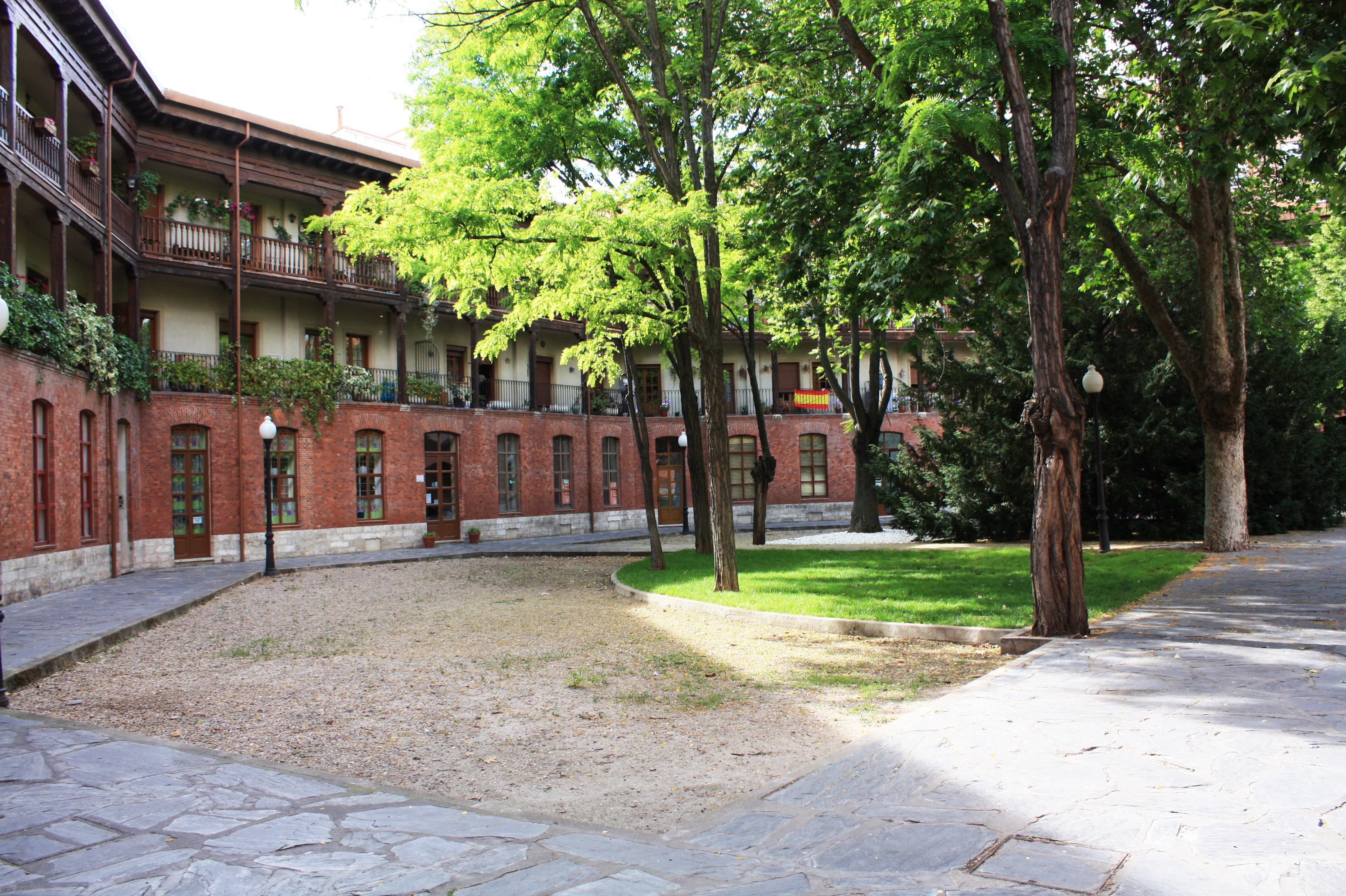 Vista de la Plaza del Viejo Coso, obra de los arquitectos Manuel Finat y Javier López de Uribe y Laya